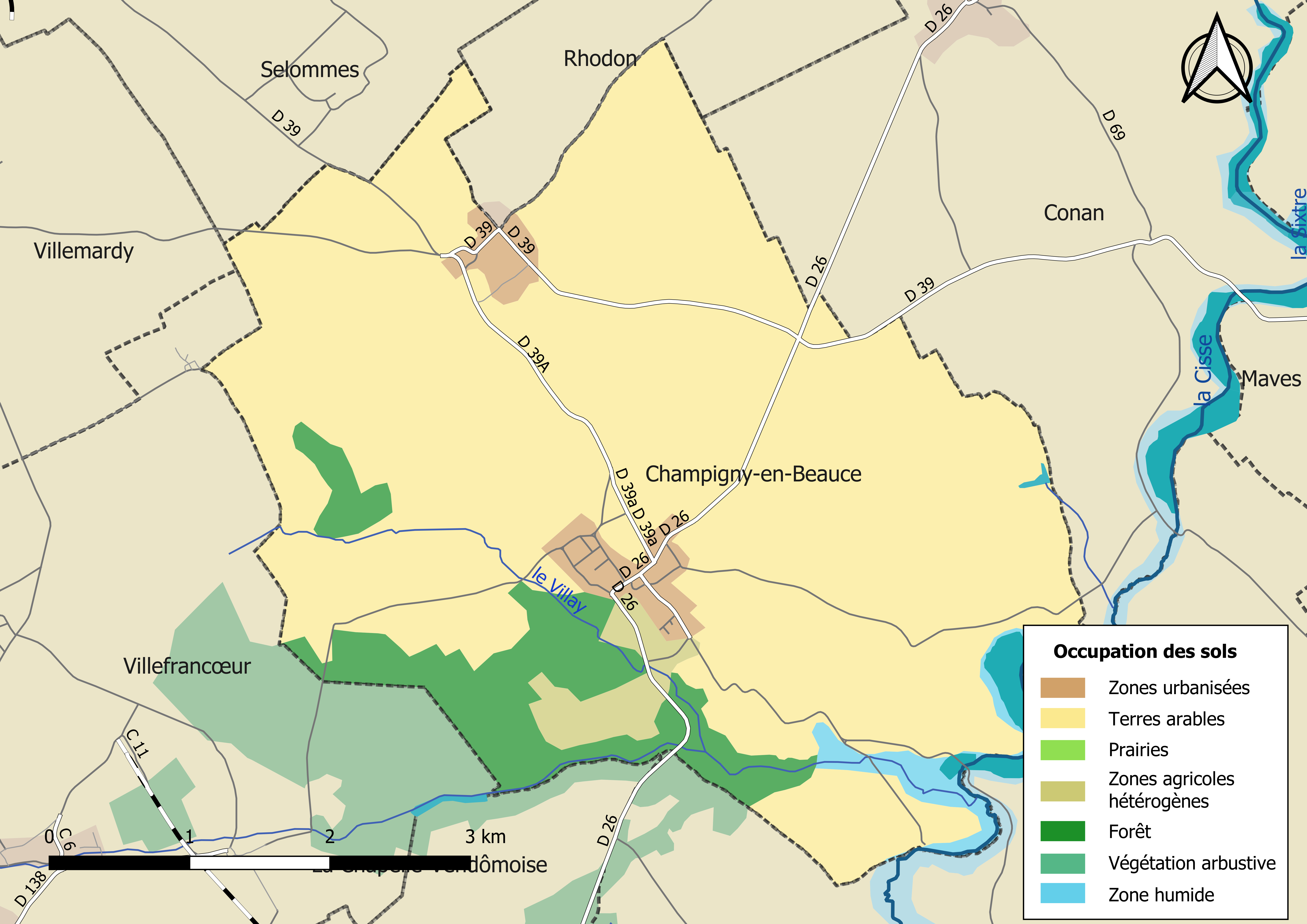 Carte des infrastructures et de l’occupation des sols en 2018 de la commune de Champigny-en-Beauce (France).